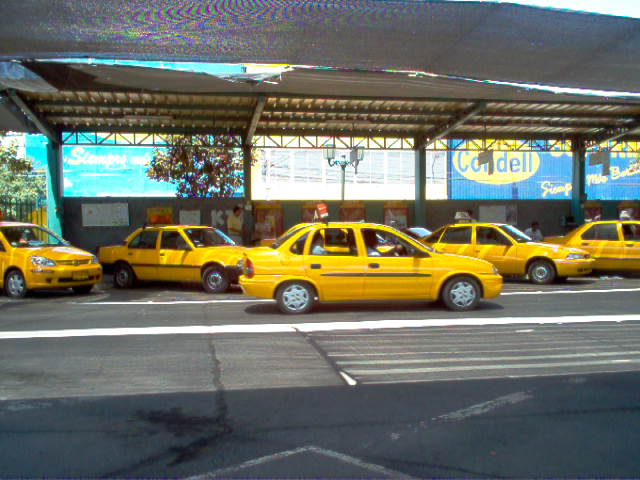 Taxi colectivo de la ciudad de Rancagua, Chile Taxi colectif de Rancagua, Chili. Rancagua regional "colectivo", Chile. Autor: Der schöne Tod Fecha: 14 de enero de 2006. Lugar: Rodoviario de Rancagua